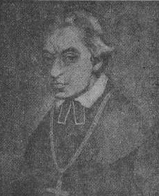 Vincenc Aleš Pařízek (1748 - 1822), Člen dominikánského řádu, pedagog, filosof, teolog a kanovník.